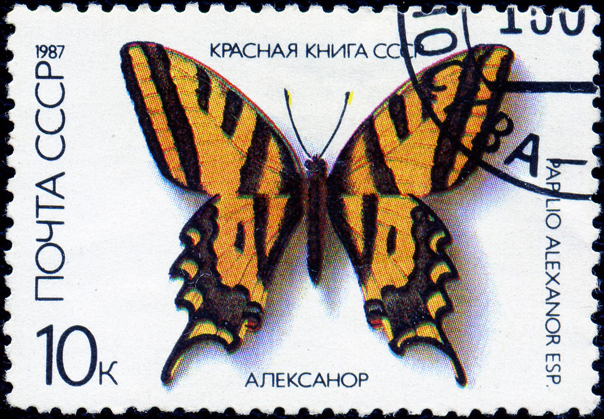 Почтовая марка СССР. 1987. Крассная книга СССР. Алексанор